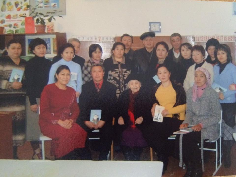 Фото где в честь ее названа гимназия